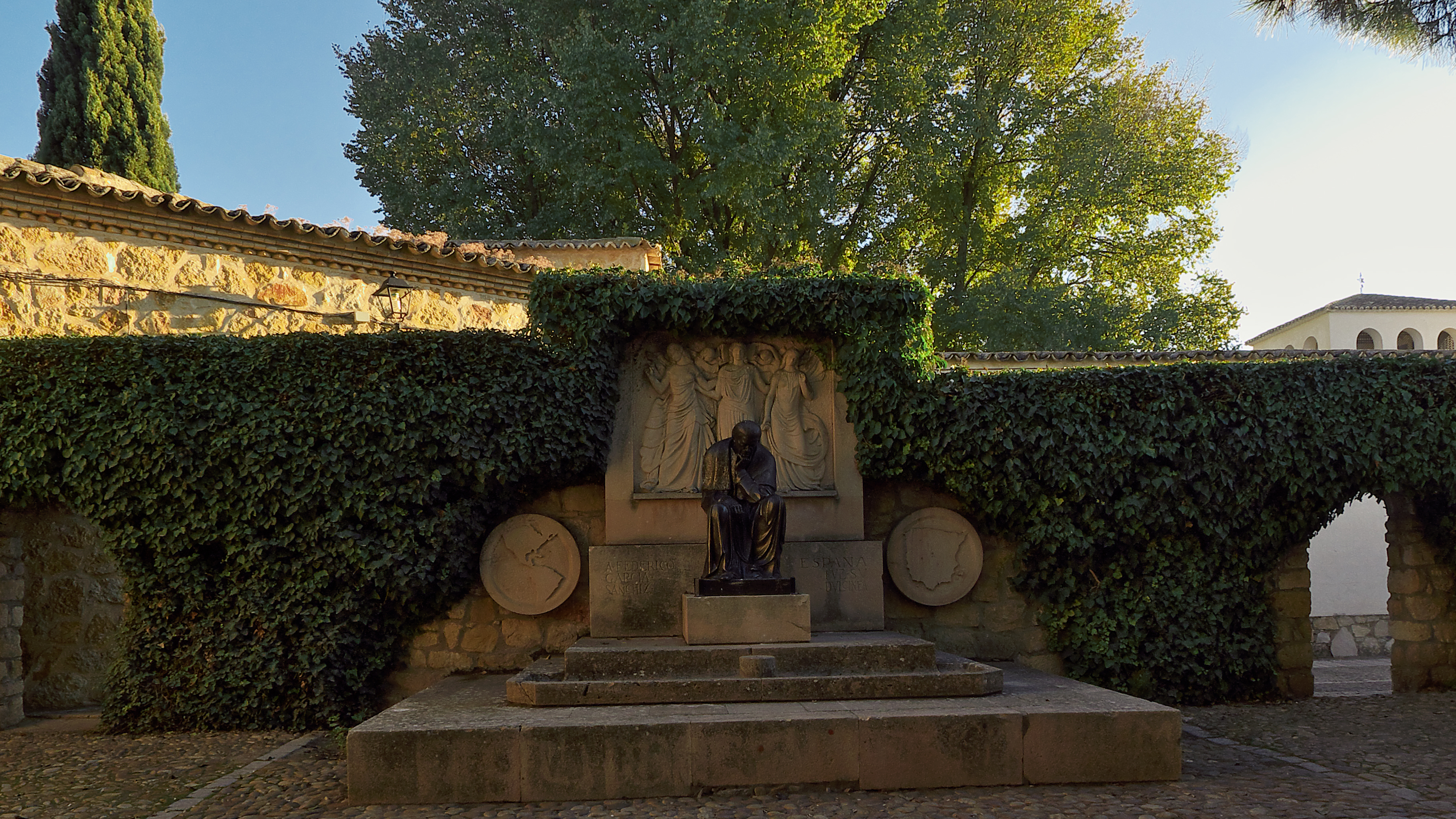 Monumento a Federico García Sanchiz en El Toboso (Toledo). Enrique Monjo Garriga (1967)